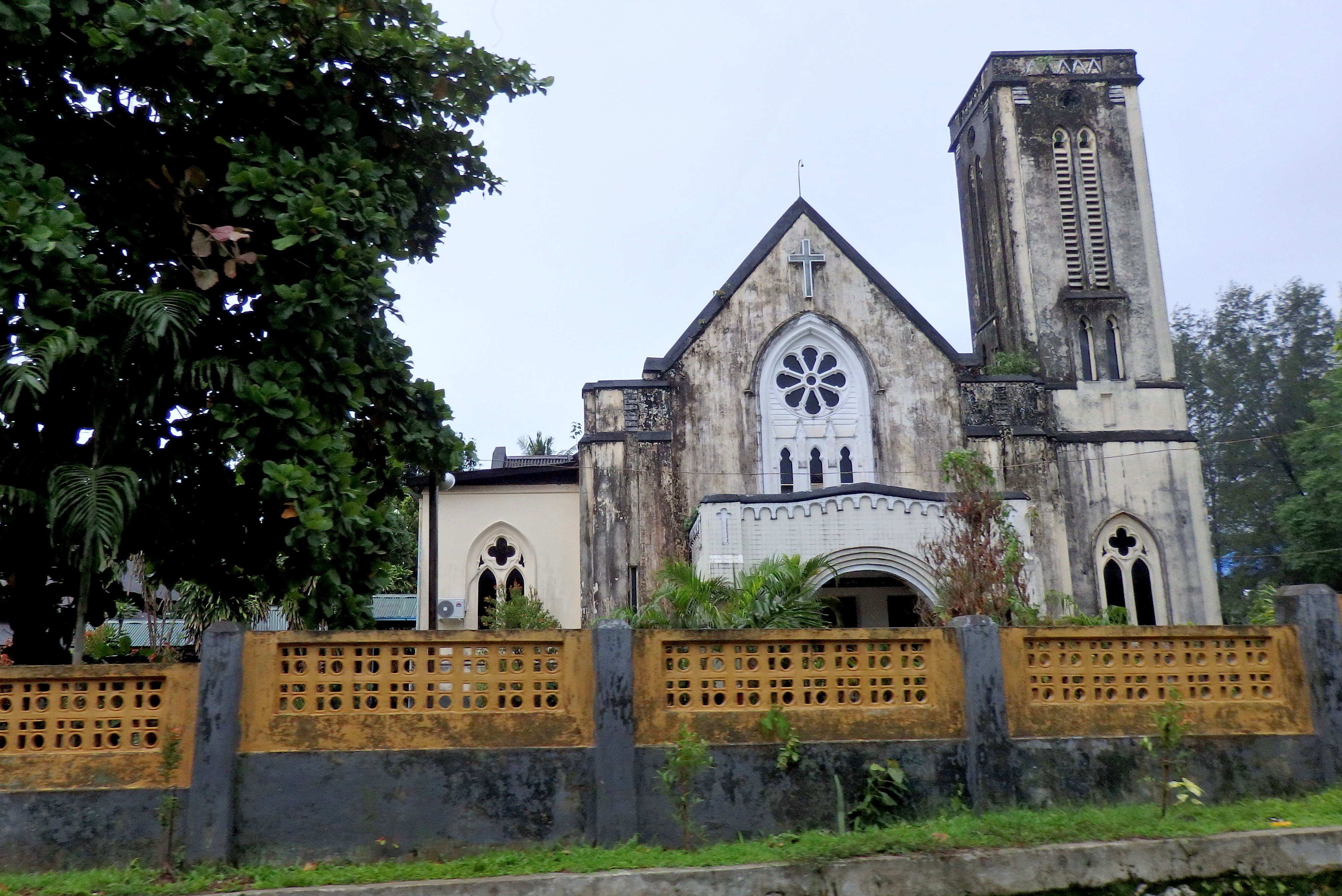 Mawlamyine MMR011001701, Myanmar (Burma)